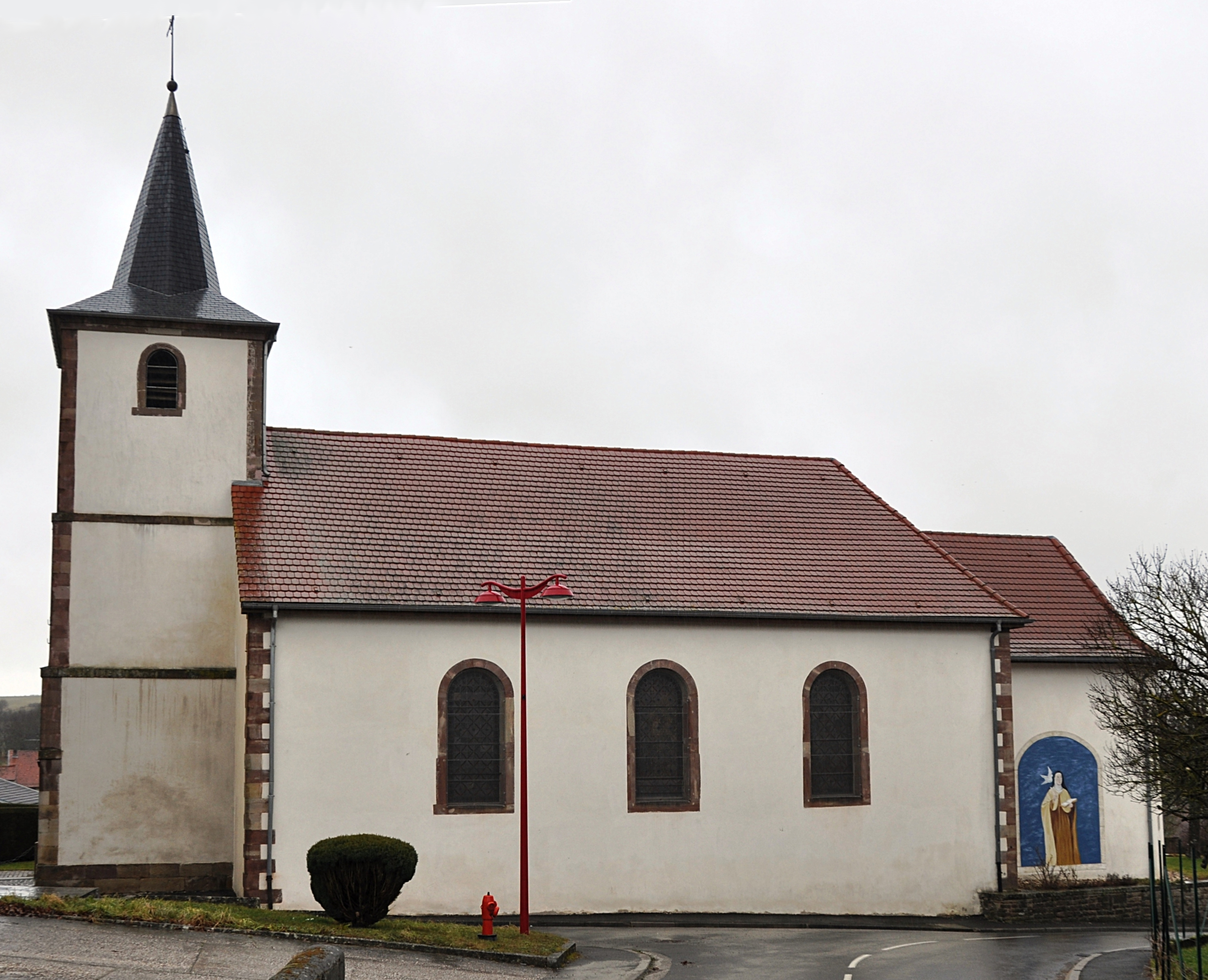 L'église Sainte-Thérèse d'Avila de Niderhoff